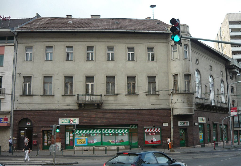 Az Agrárszövetség (egykori?) központja Budapesten, a Krisztina tér 1. szám alatt (az irodában ma az I. kerületi MSZP irodája működik)